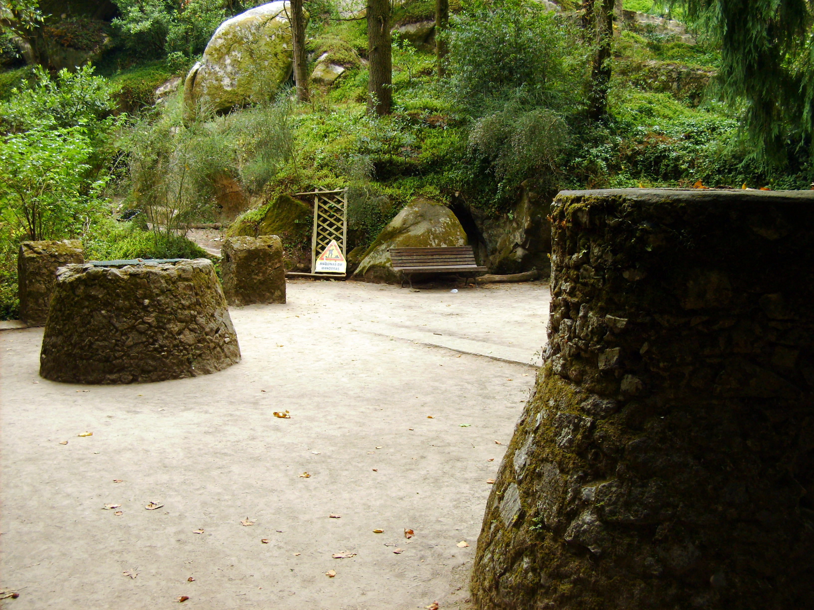 Castelo de Sintra (Castelo dos Mouros), Sintra, Portugal: respiradouros da cisterna